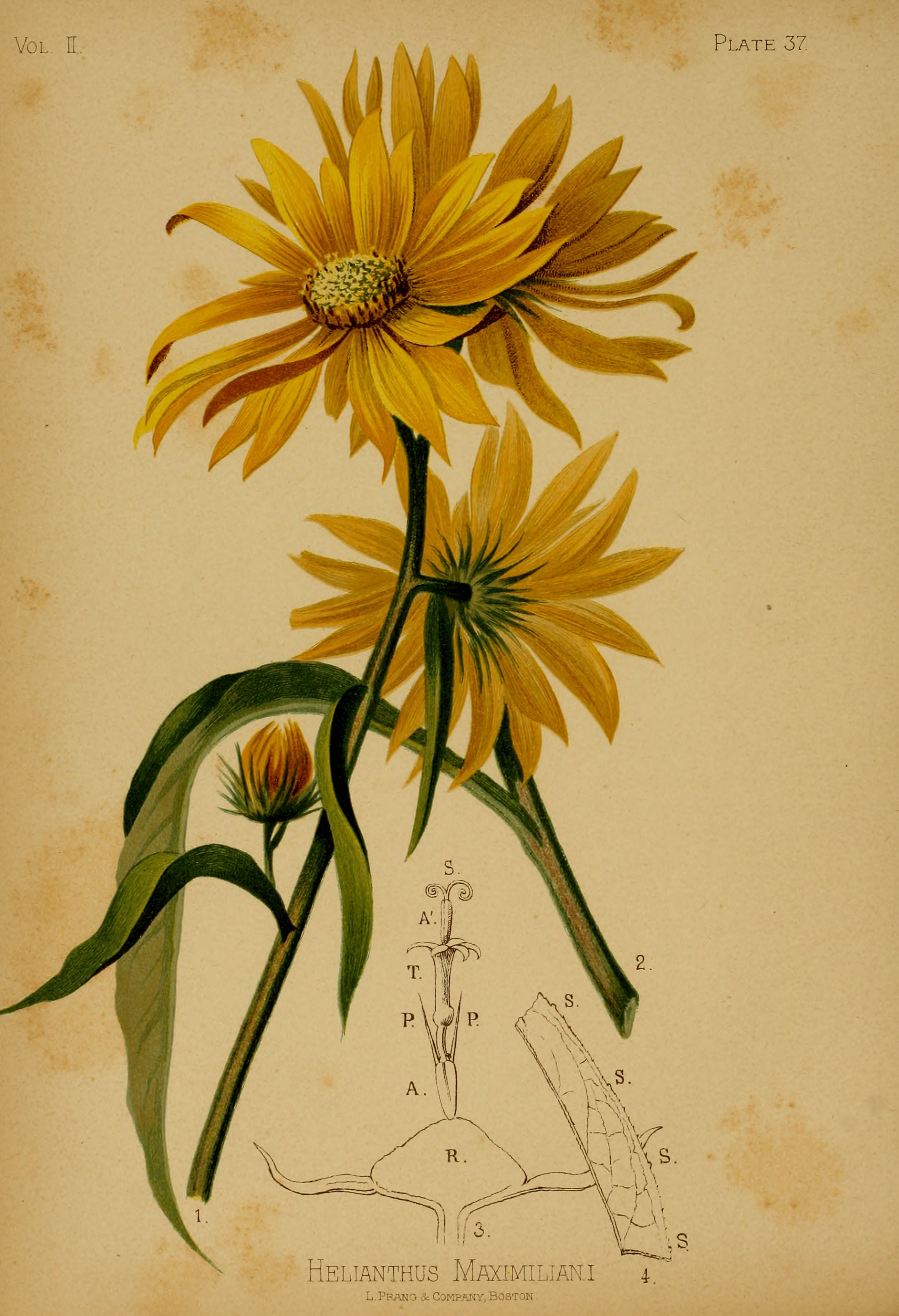 Legende: 1 Oberer Teil der Pflanze. 2 Mittlerer Teil der Pflanze. 3 Körbchenboden, Längsschnitt, mit Röhrenblüte (vergr.). R Körbchenboden. A. Fruchtknoten. P. Pappus. T Kronröhre. A’ Staubblattröhre. S Griffel. 4 Blattrandauschnitt, leicht gesägt bei S, dazwischen mit kleinen Zähnchen.